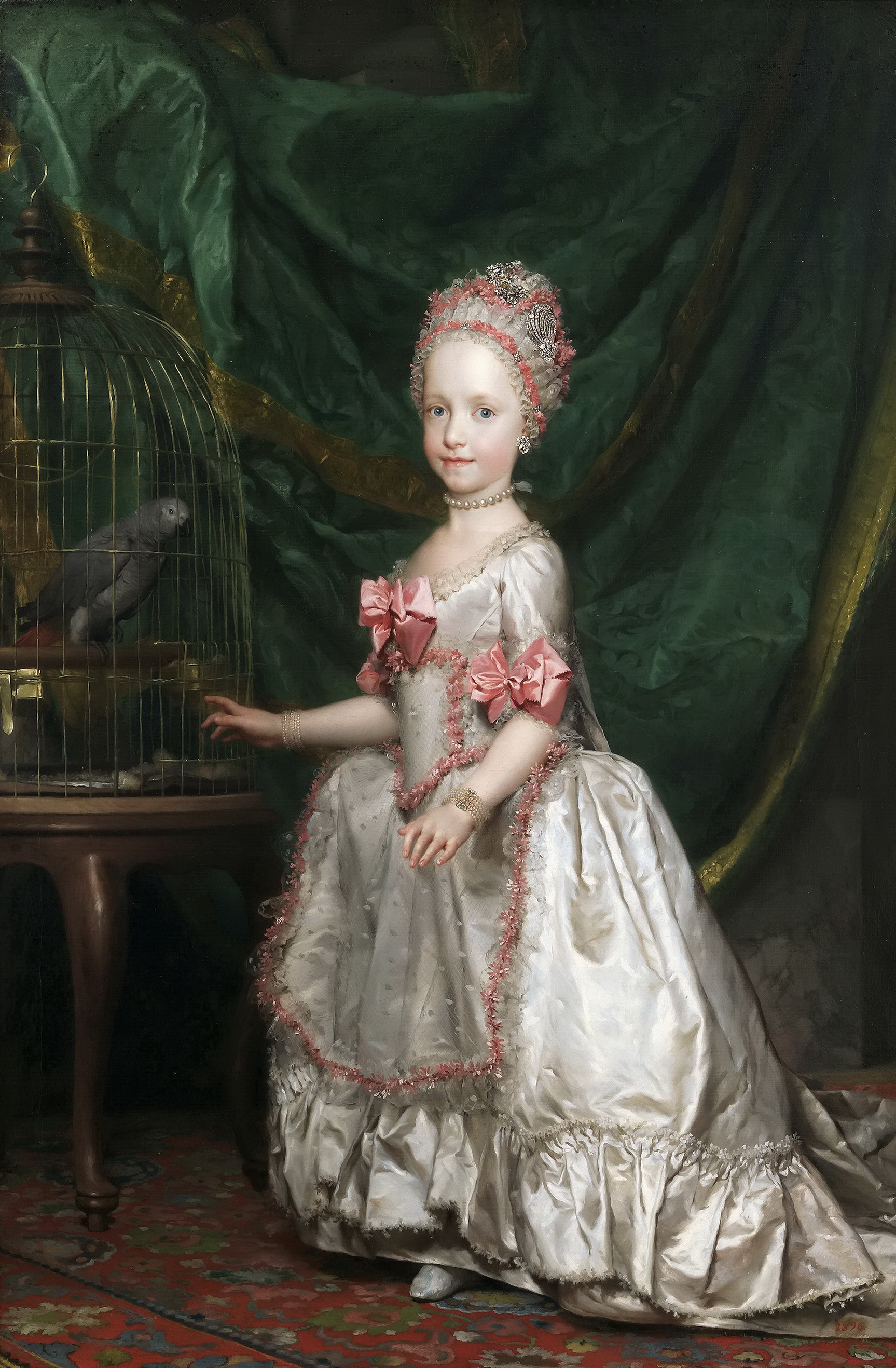 Retrato de la archiduquesa María Teresa Josefa de Austria (1767-1827), que fue hija del emperador Leopoldo II del Sacro Imperio Romano Germánico y de la emperatriz María Luisa de Borbón.